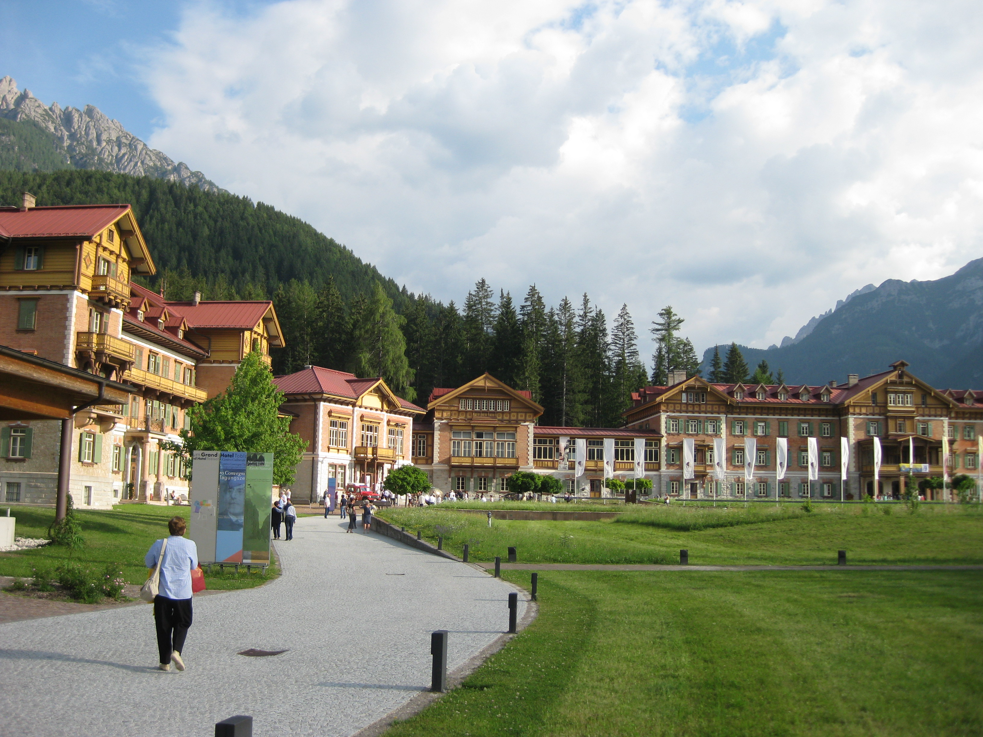 Grandhotel Toblach (Dobbiaco)